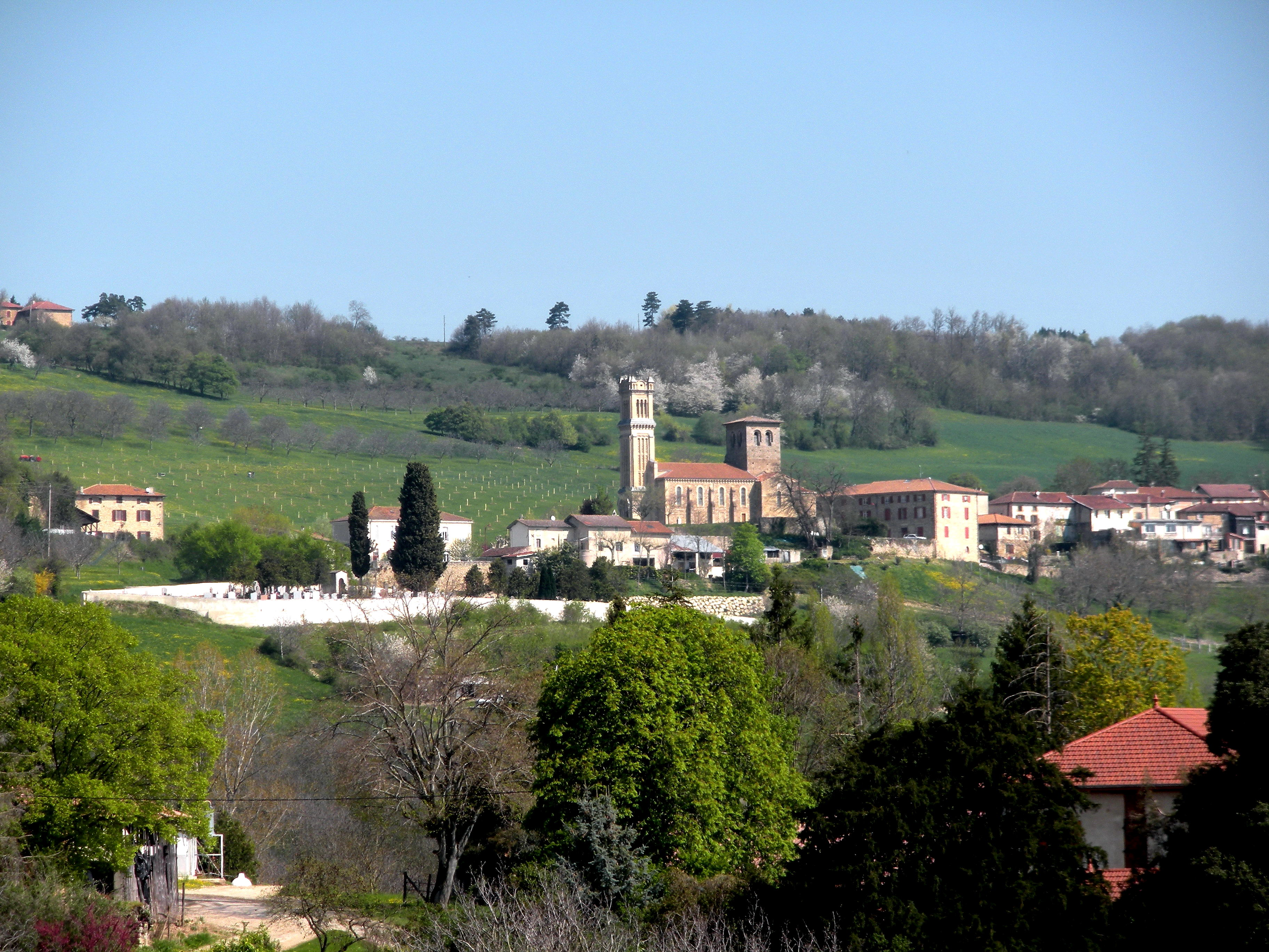 le village de Montmiral